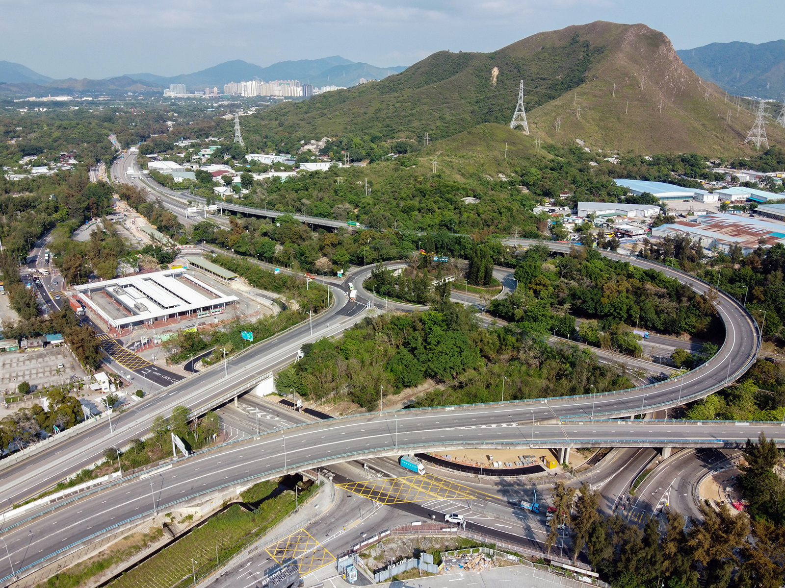 San Tin Interchange